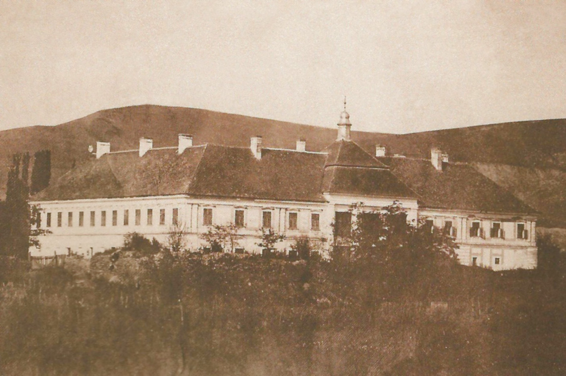 Photo de 1864 du château Haller de Kerelőszentpál/Sânpaul, Transylvanie.